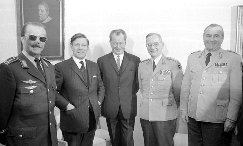 Bundeswehrführung bei Bundeskanzler Brandt in Bonn